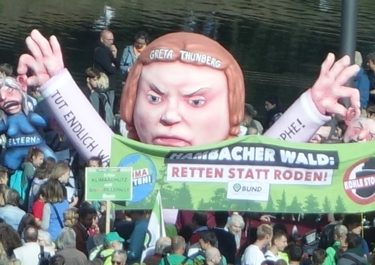 Fridays for Future, Demonstration in Düsseldorf am 20. September 2019.